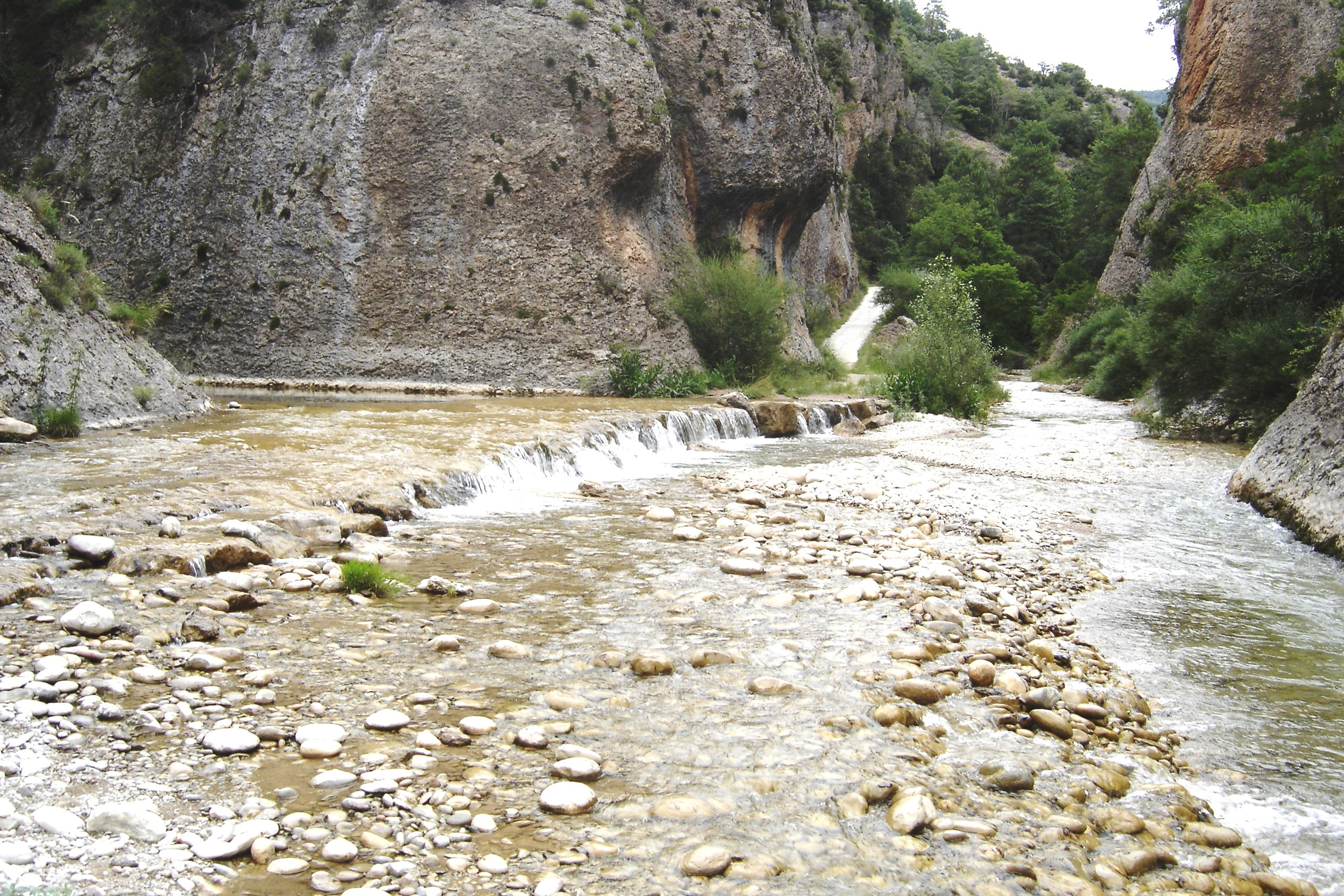 Aigüesjuntes (Lladurs, Solsonès). El riu de la dreta és la Riera de Canalda i el de l'esquerra, el Riu Fred.